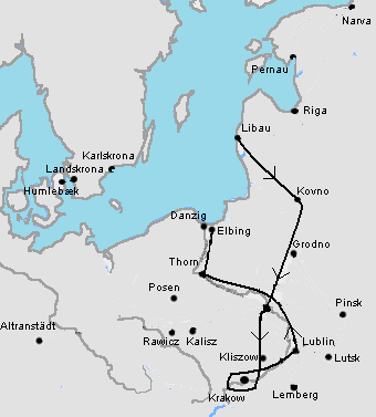 Kriegsfeldzug Karls XII. 1702-1703